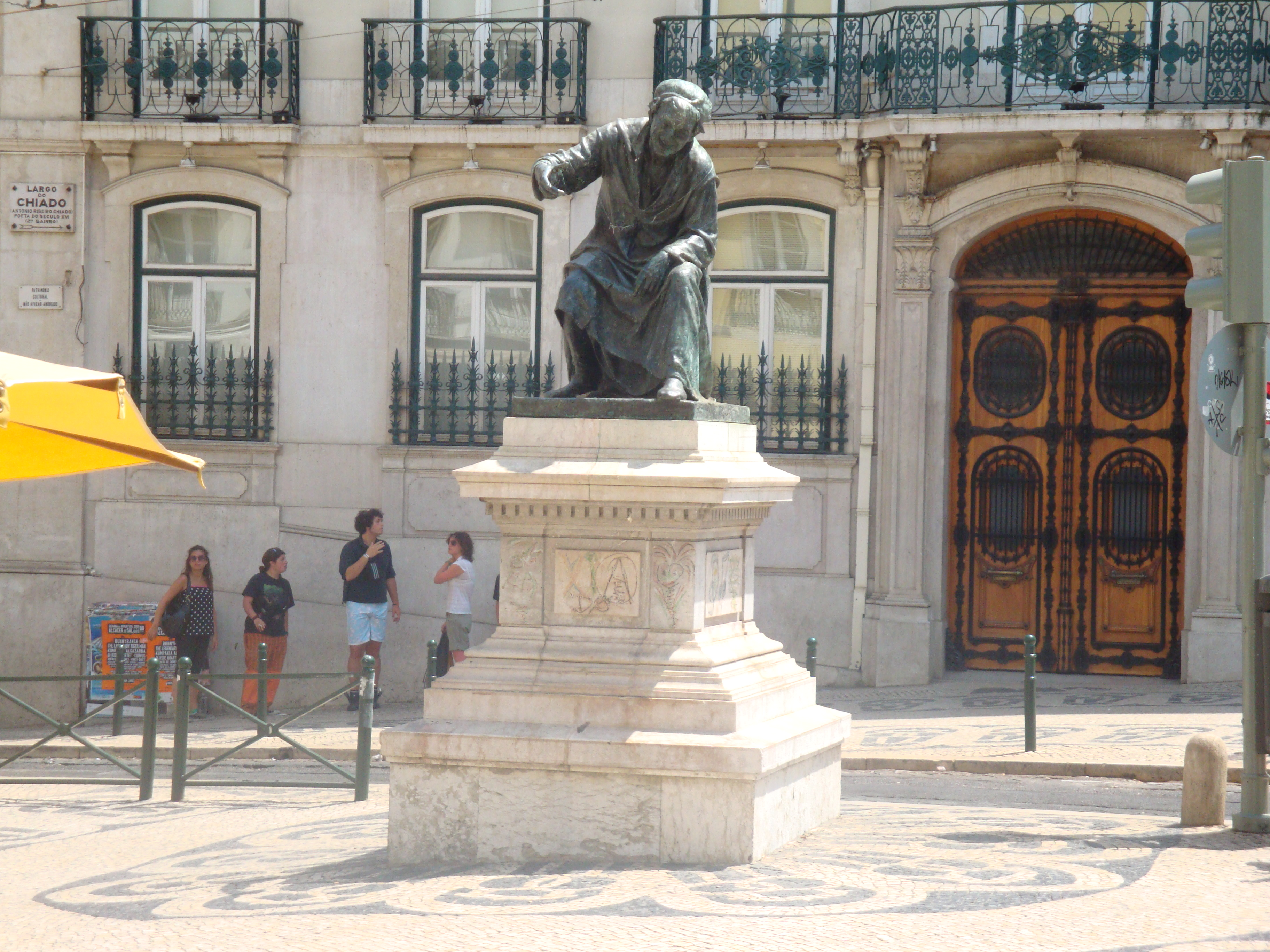 Statue of António Ribeiro Chiado